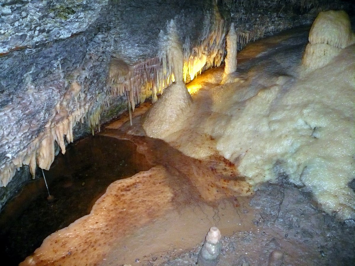 Eberstadter Tropfsteinhöhle